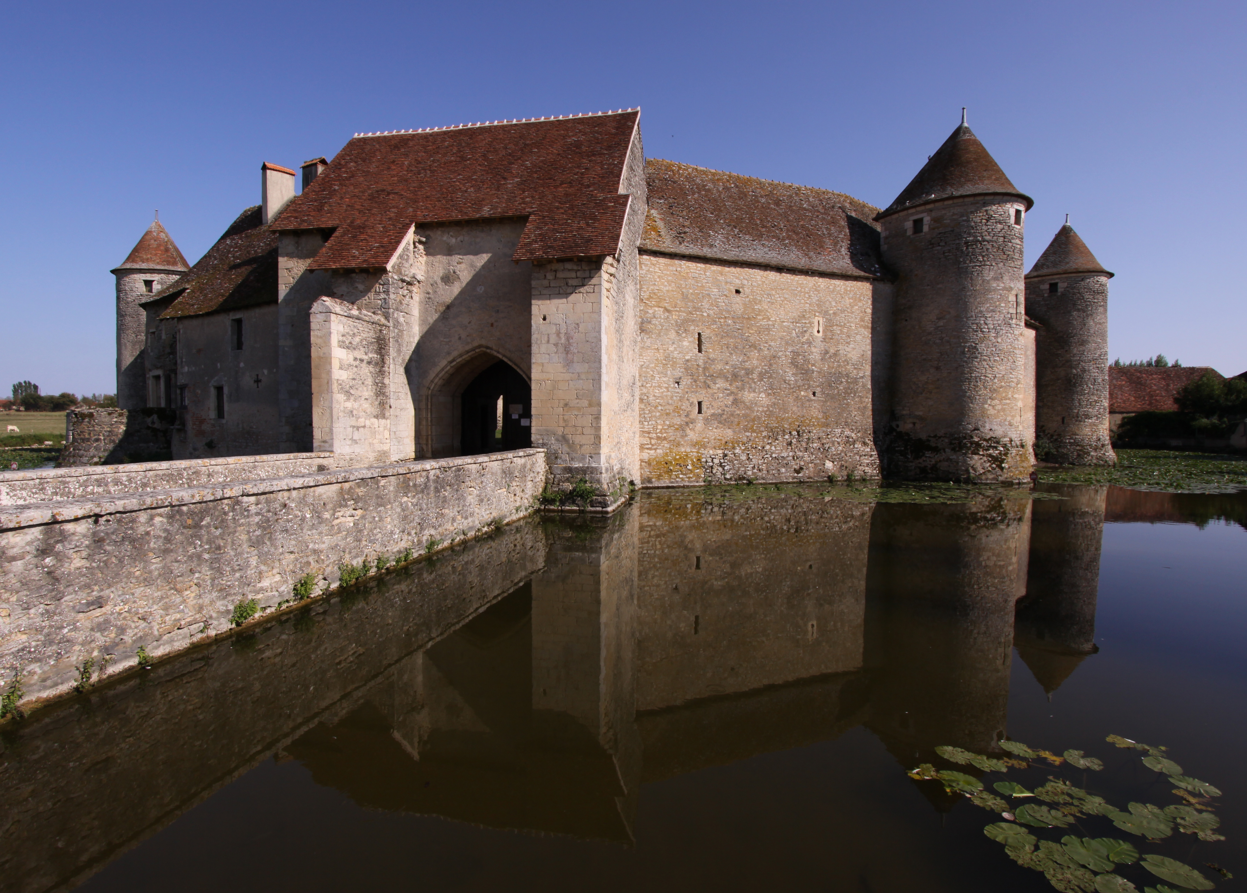 Schloss Sagonne im französischen Département Cher